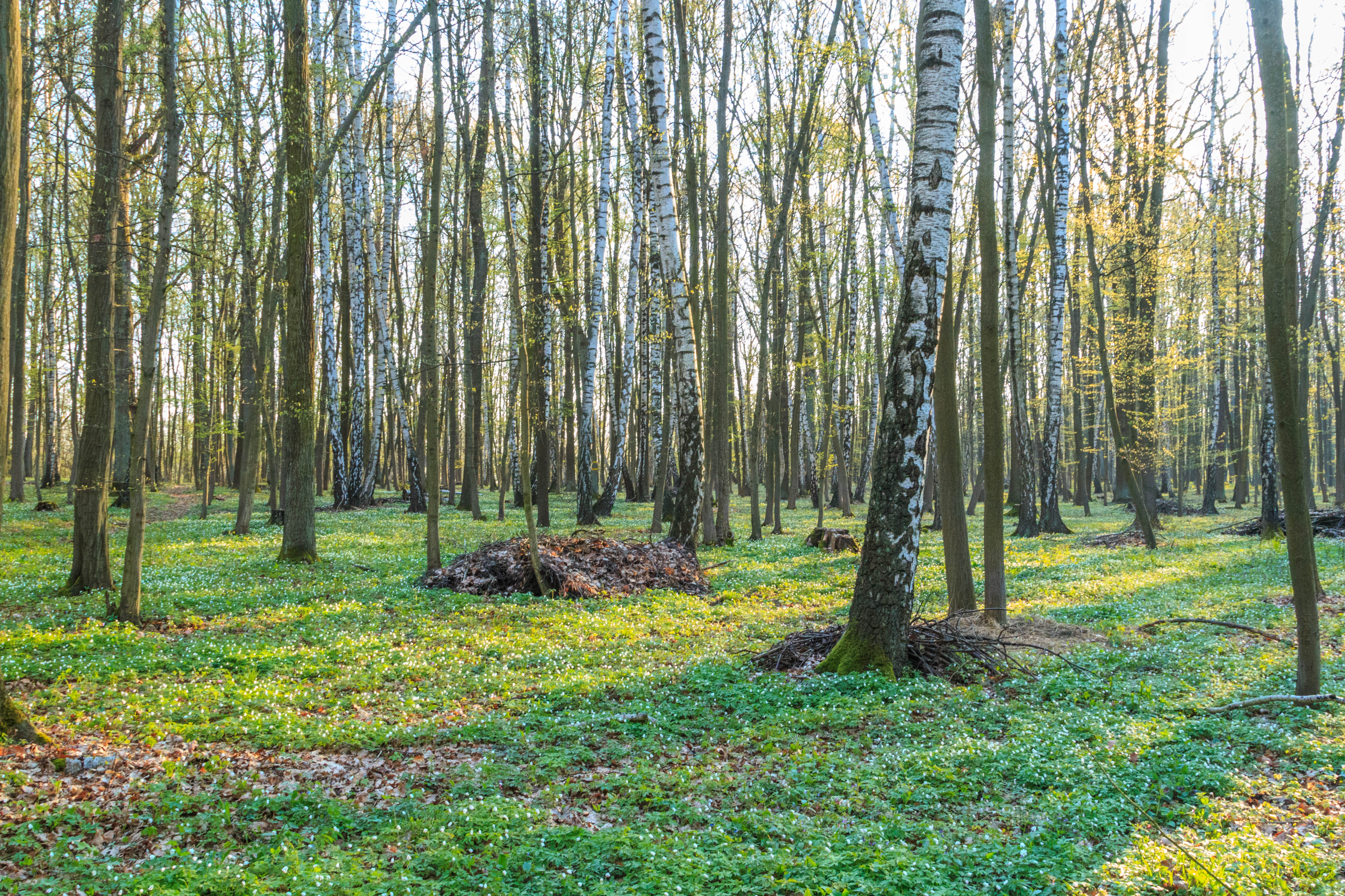 Přírodní památka Kazatelna Project: Chráněná území.